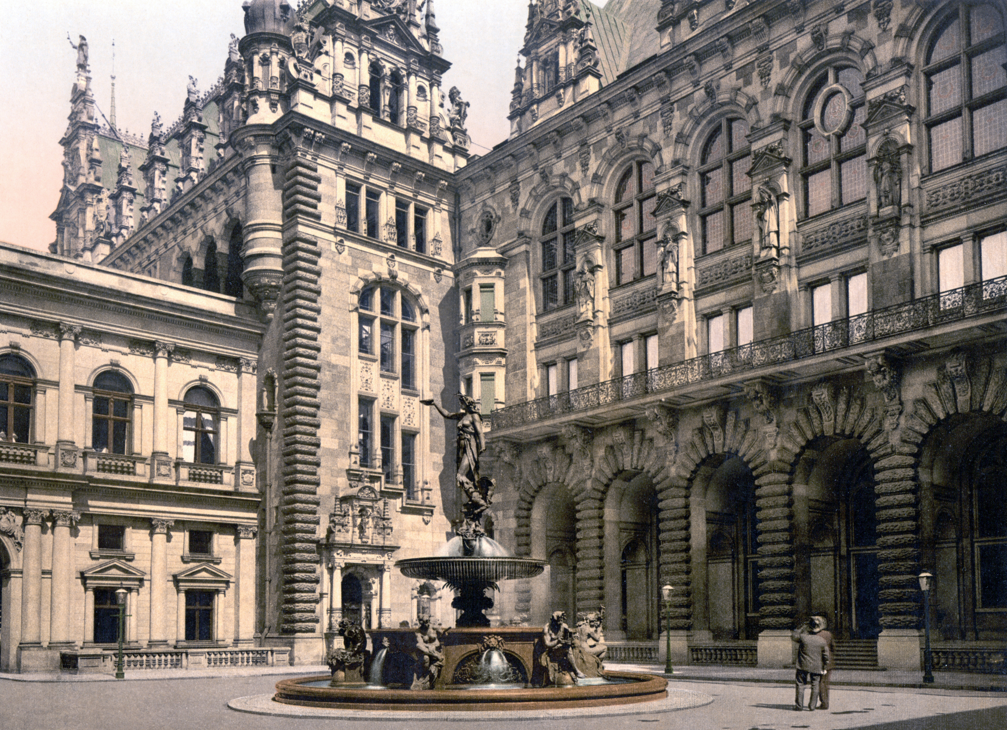 Hamburg, Rathaus, Hof mit Hygieia-Brunnen.